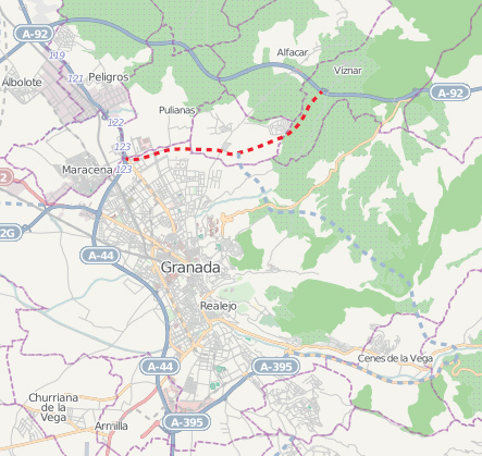 Ronda Norte de Granada (en construcción)